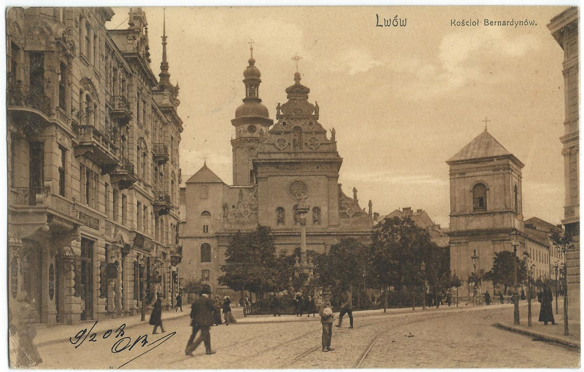 Vue de Lwow (ou Lemberg, aujourd'hui Lviv en Ukraine), dans l'empire austro-hongrois, au début du XXe siècle.